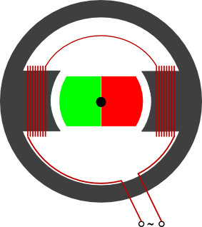 Innenpolgenerator